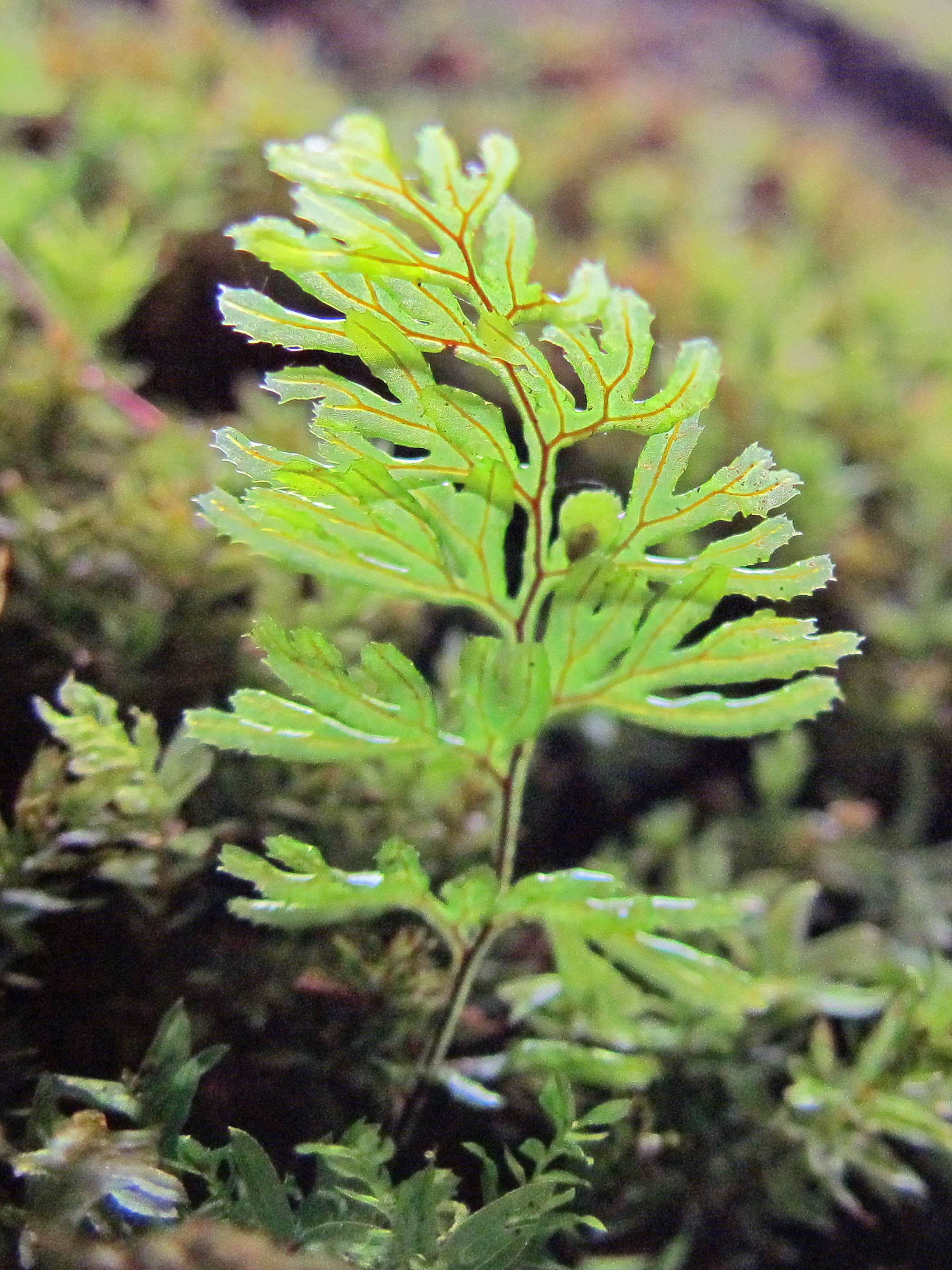 Platte vliesvaren (Hymenophyllum tunbrigense), Luxemburg